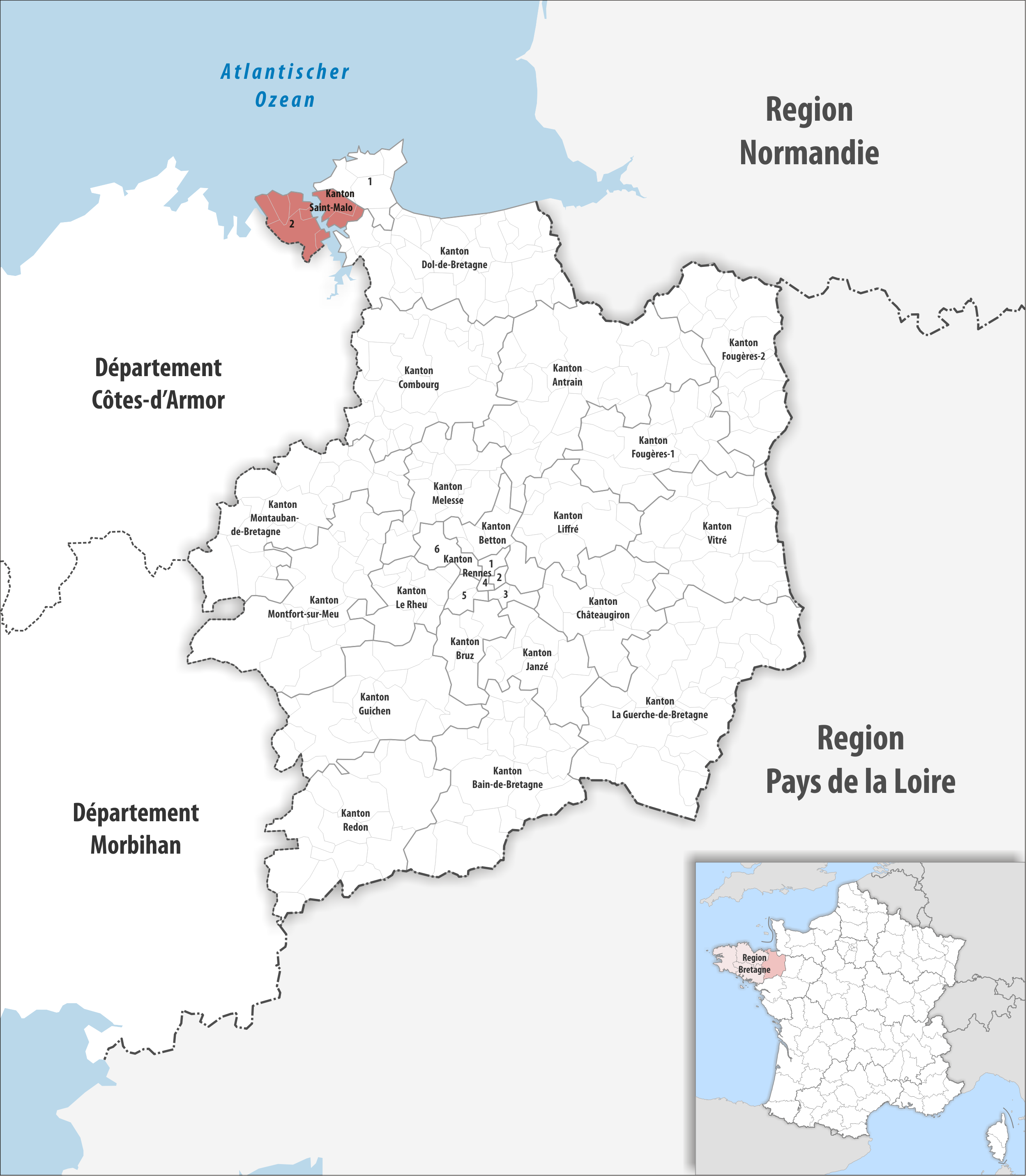 Lage des Kantons Saint-Malo-2